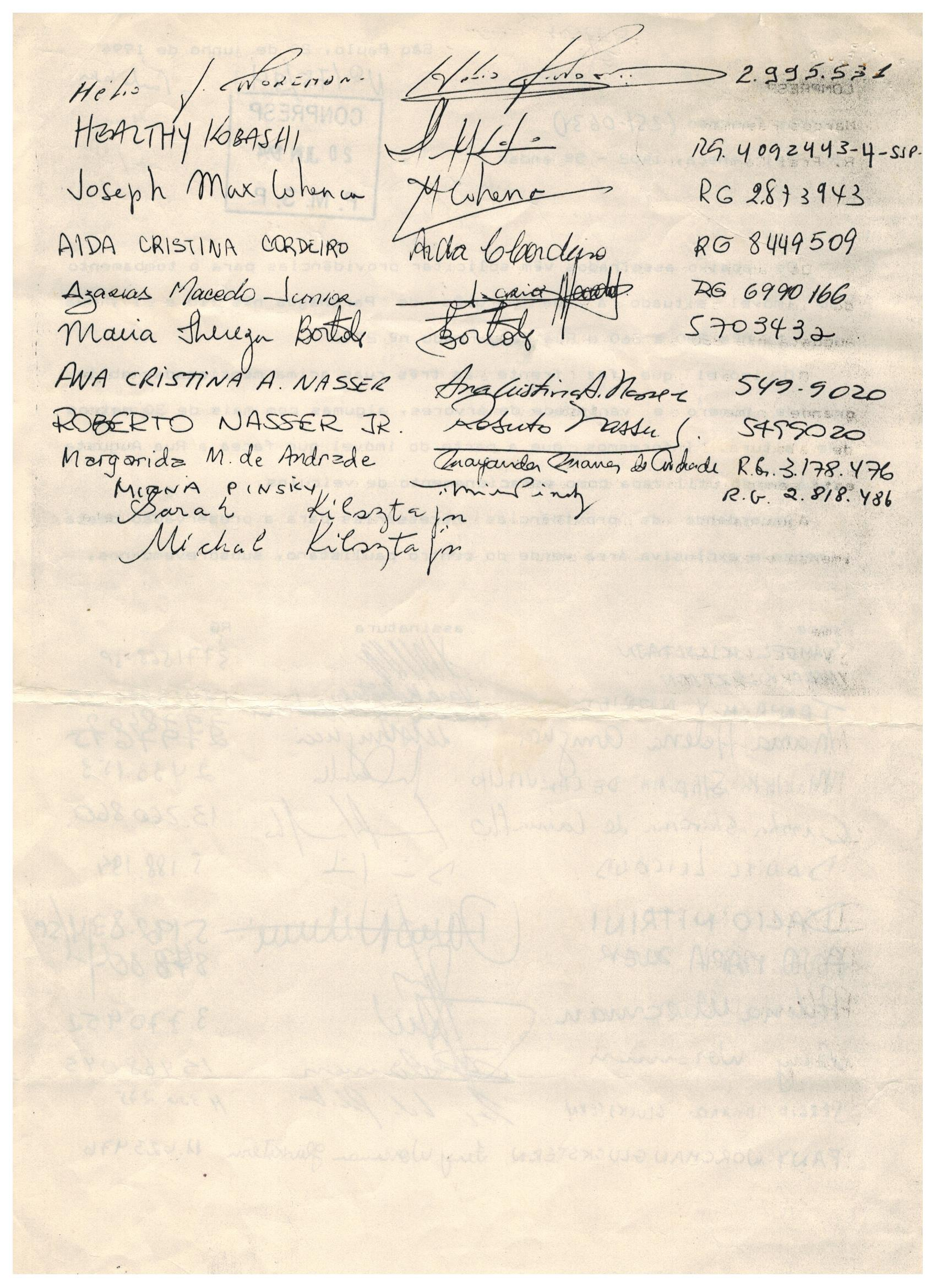 1994 20jun Solicitação ao Conpresp (abaixo assinado) p.2.jpeg